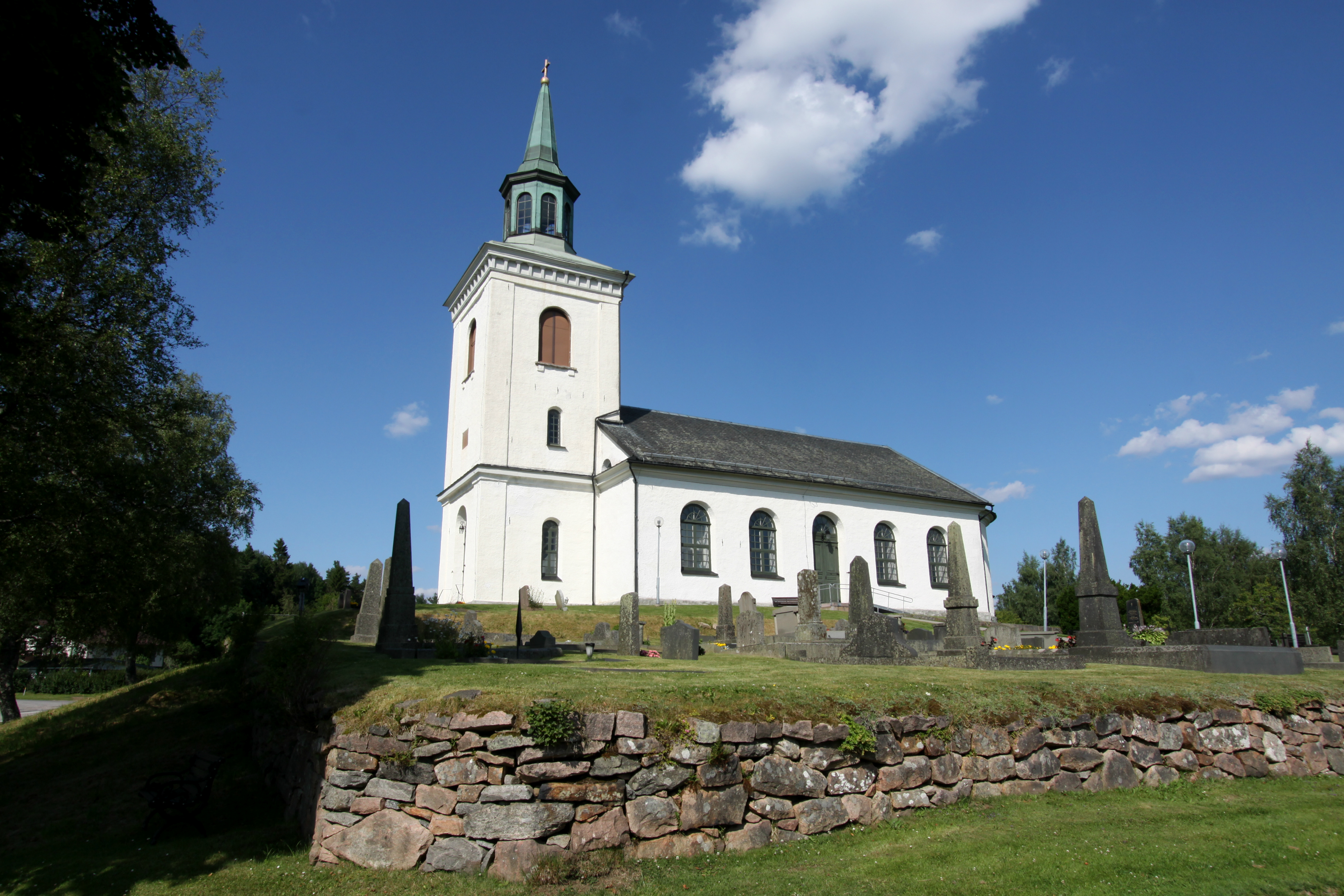 Äspereds kyrka